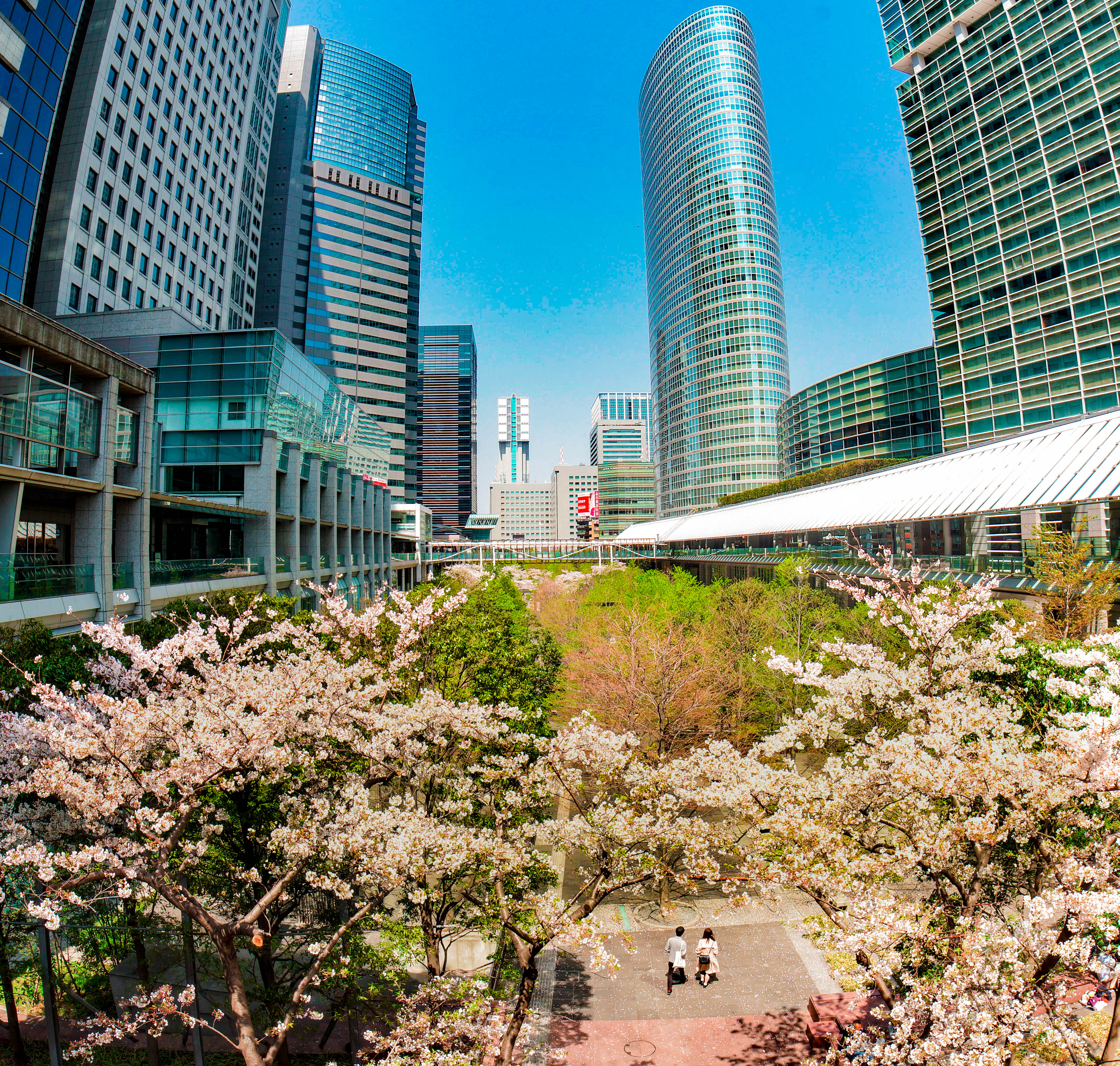 品川インターシティ、グランドコモンズとセントラルガーデン